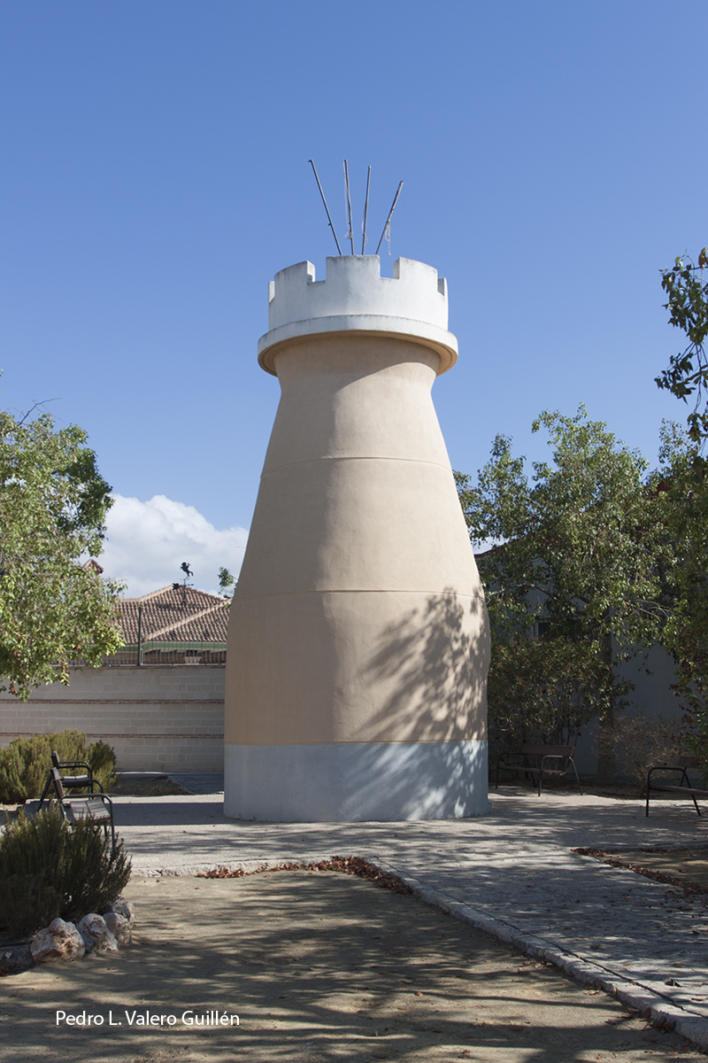 Monolito reciente que recuerda el primer amojonamiento en el mismo lugar, realizado en el siglo XIII, para señalar la frontera entre Castilla y Aragón.